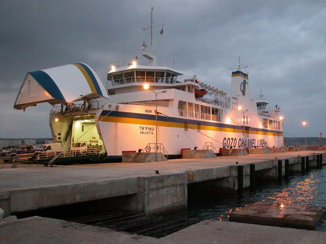 Fährschiff Ta' Pinu